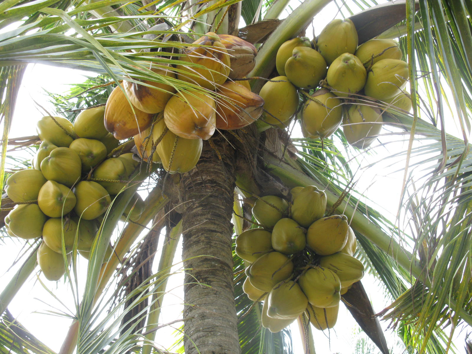 cocotier chargé à Sèmé